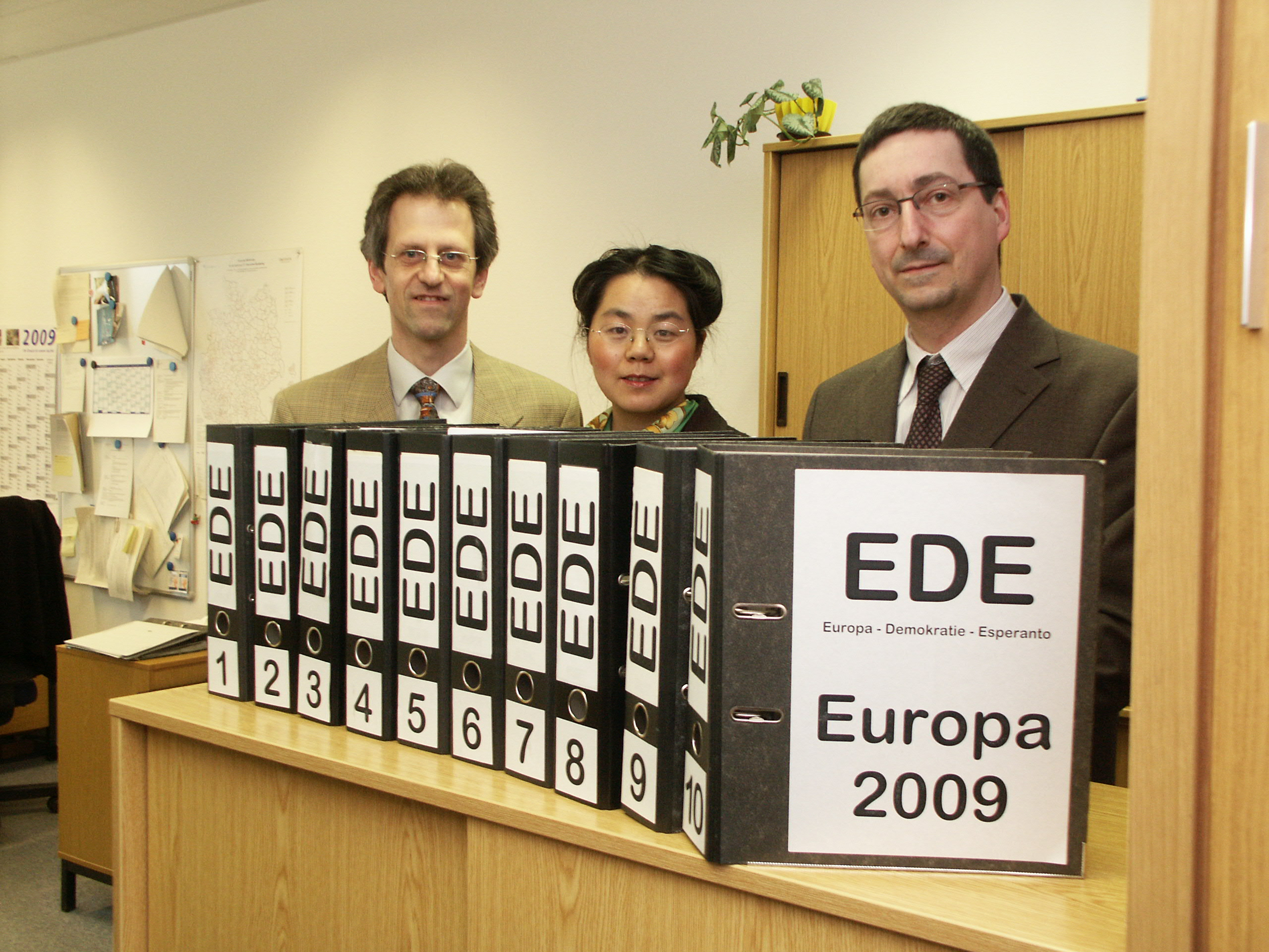 Aktivuloj de EDE-Germanio dum transdono de 5.240 subtenaj subskriboj en Wiesbaden, 2009-03-23